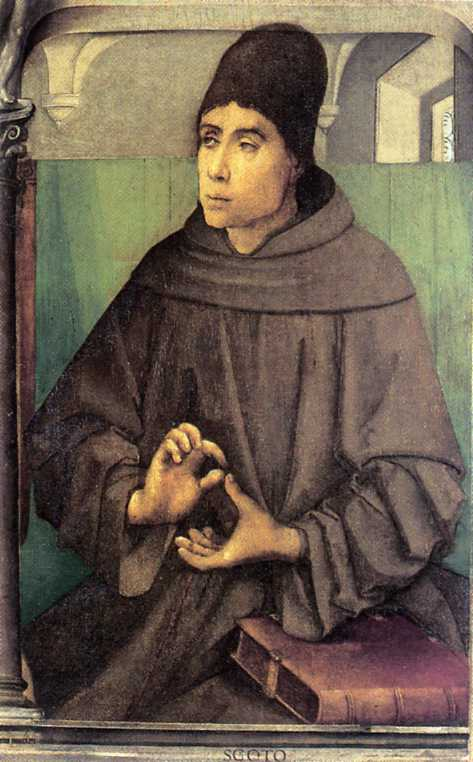 Scoto (Duns Scoto) - Studiolo di Federico da Montefeltro